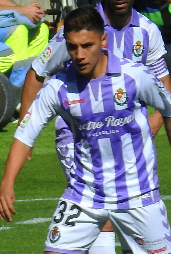 Michel controlando un balón.